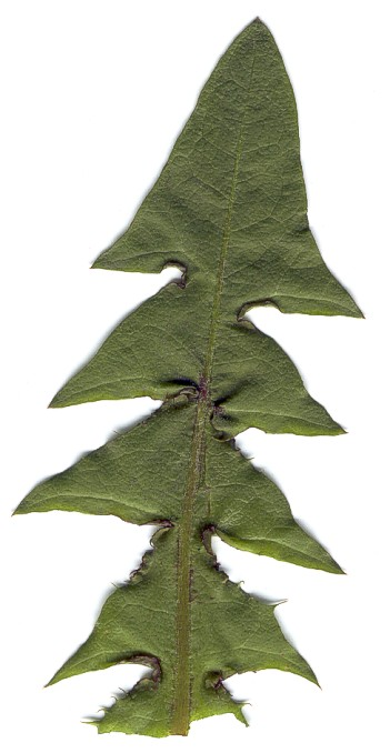 Liść mniszka lekarskiego (Taraxacum officinale).